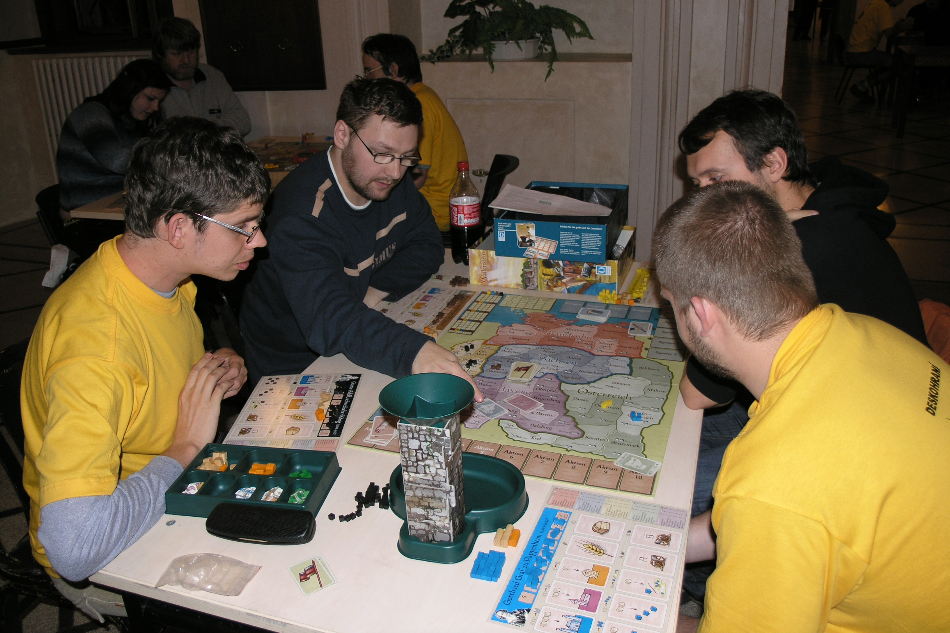 Herní festival Deskohraní 2008 - Wallenstein